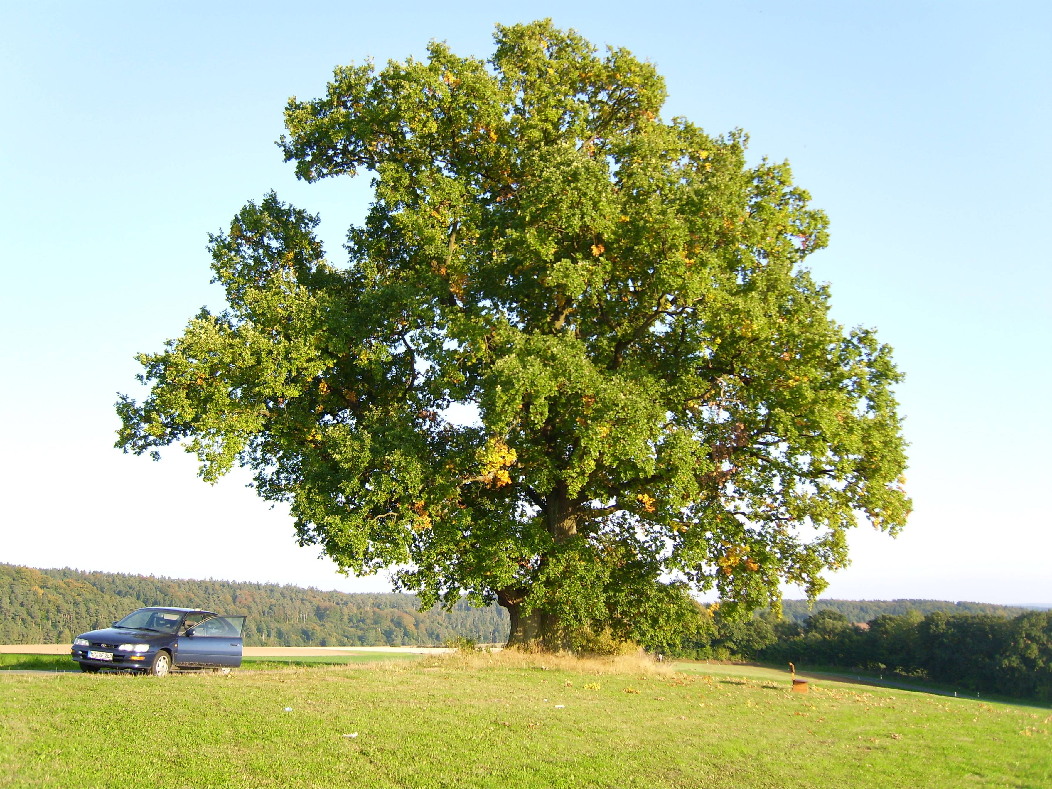 Der Burgwald an der Rosenthaler Rodung mit der mehrere hundert Jahre alten Stieleiche (Gerichtseiche am Galgenberg)